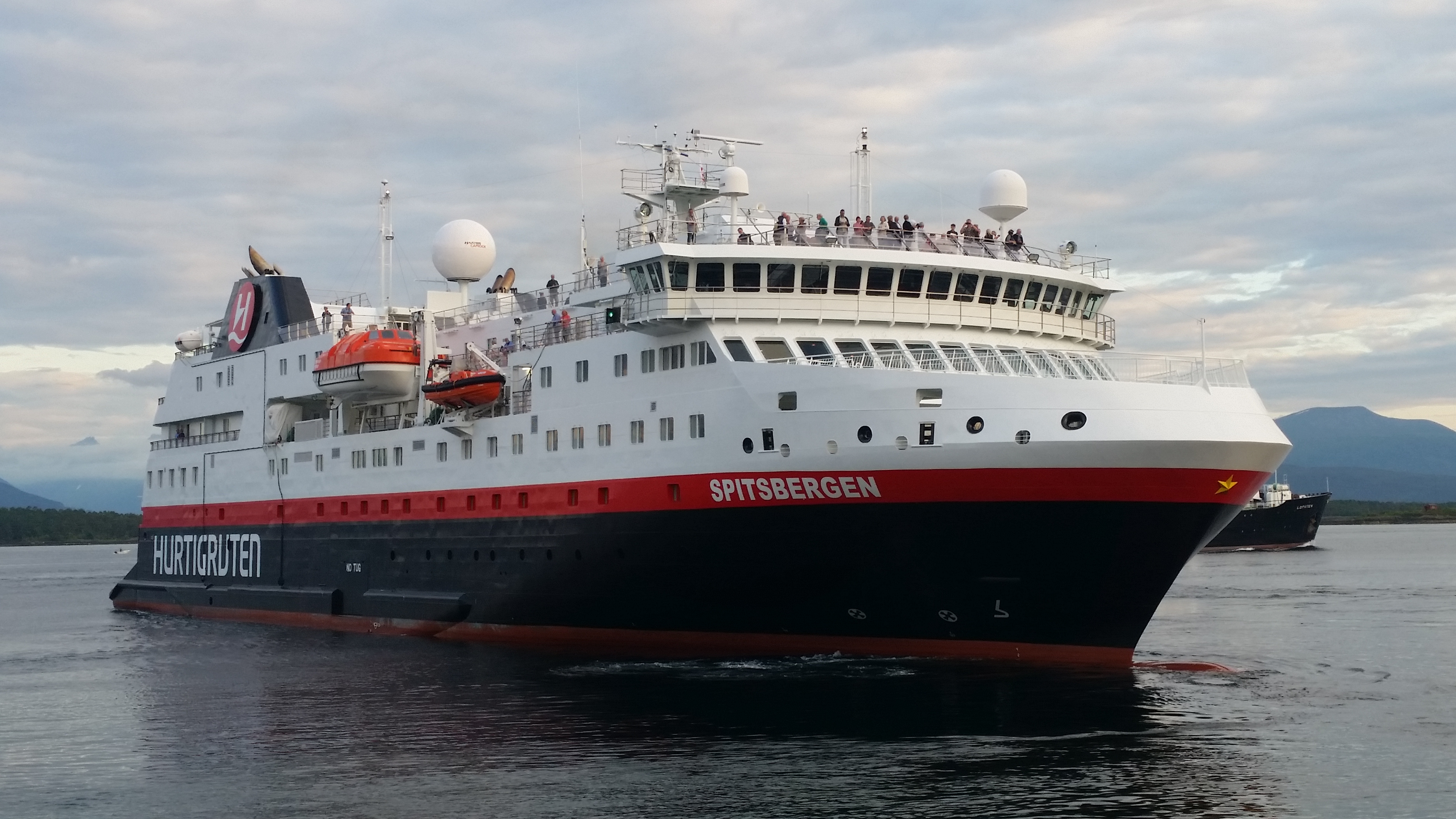 MS Spitsbergen i Molde, juli 2016